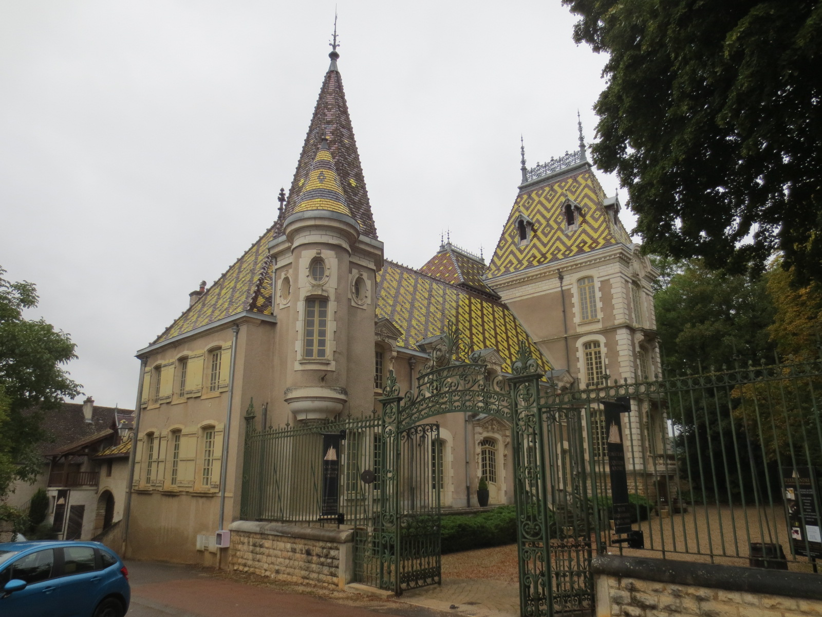 Château de Corton André